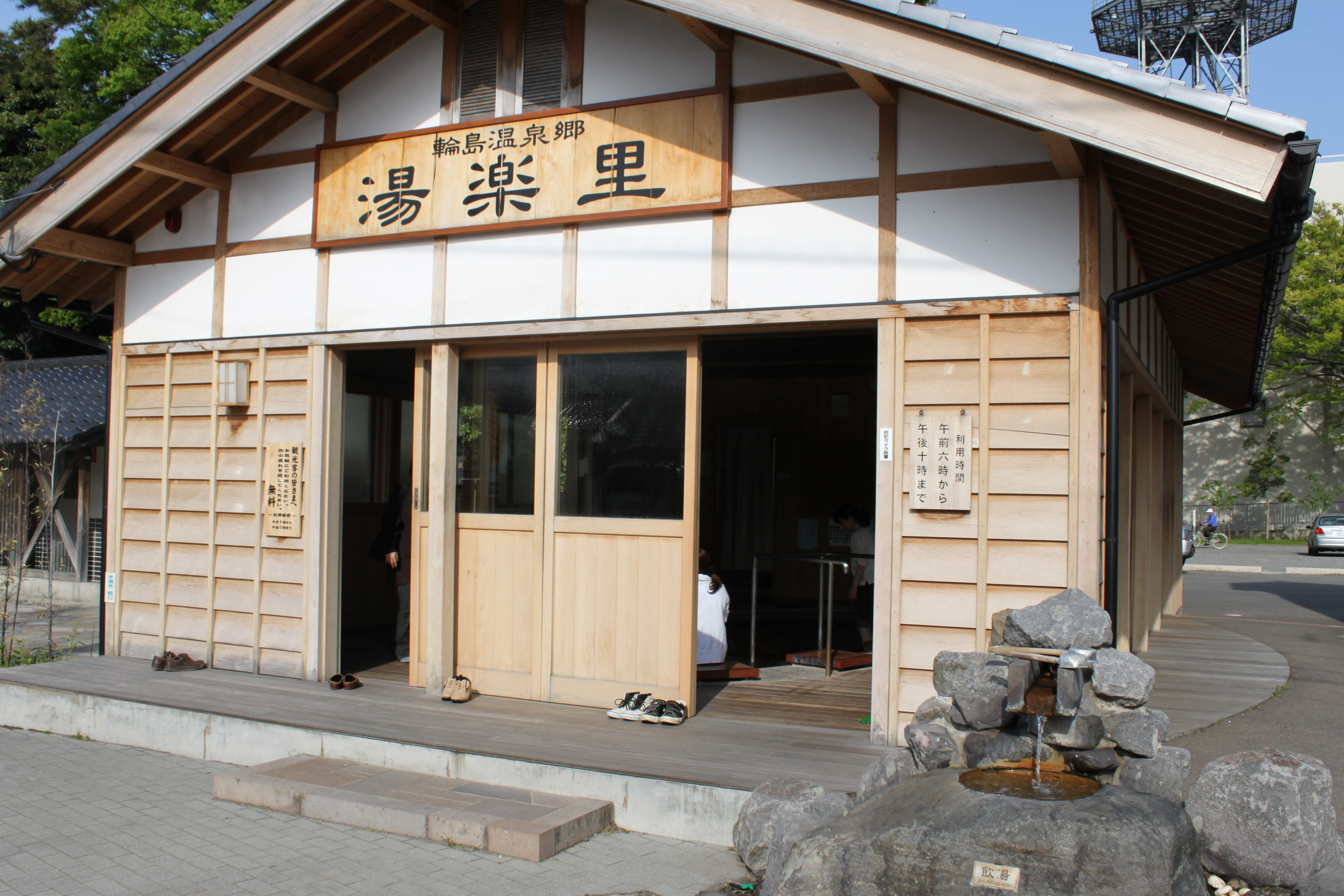 輪島温泉・足湯湯楽里